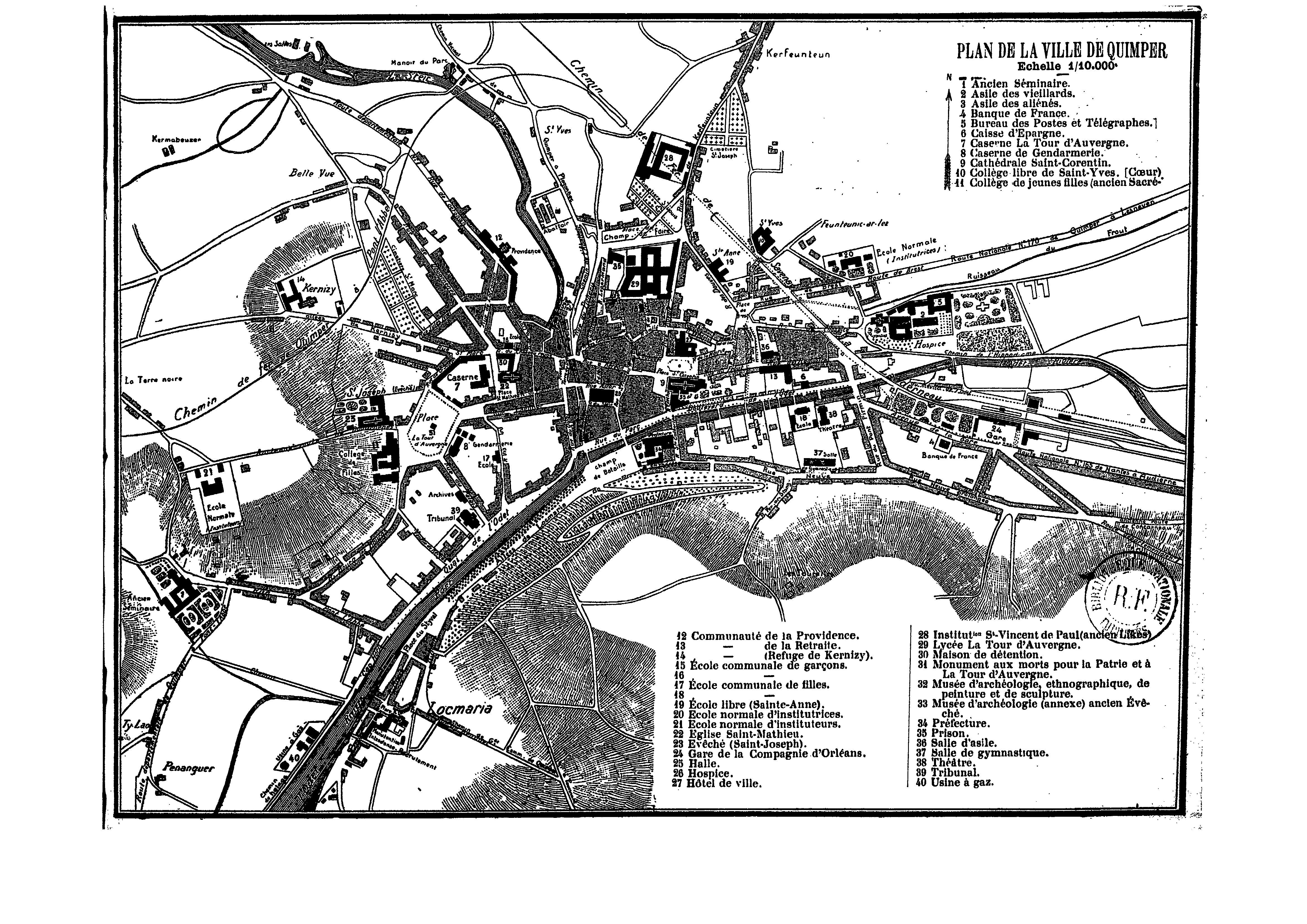 Plan de la ville de Quimper au 1/10000e, publié dans l'ouvrage de Jean-Marie Abgrall en 1910.